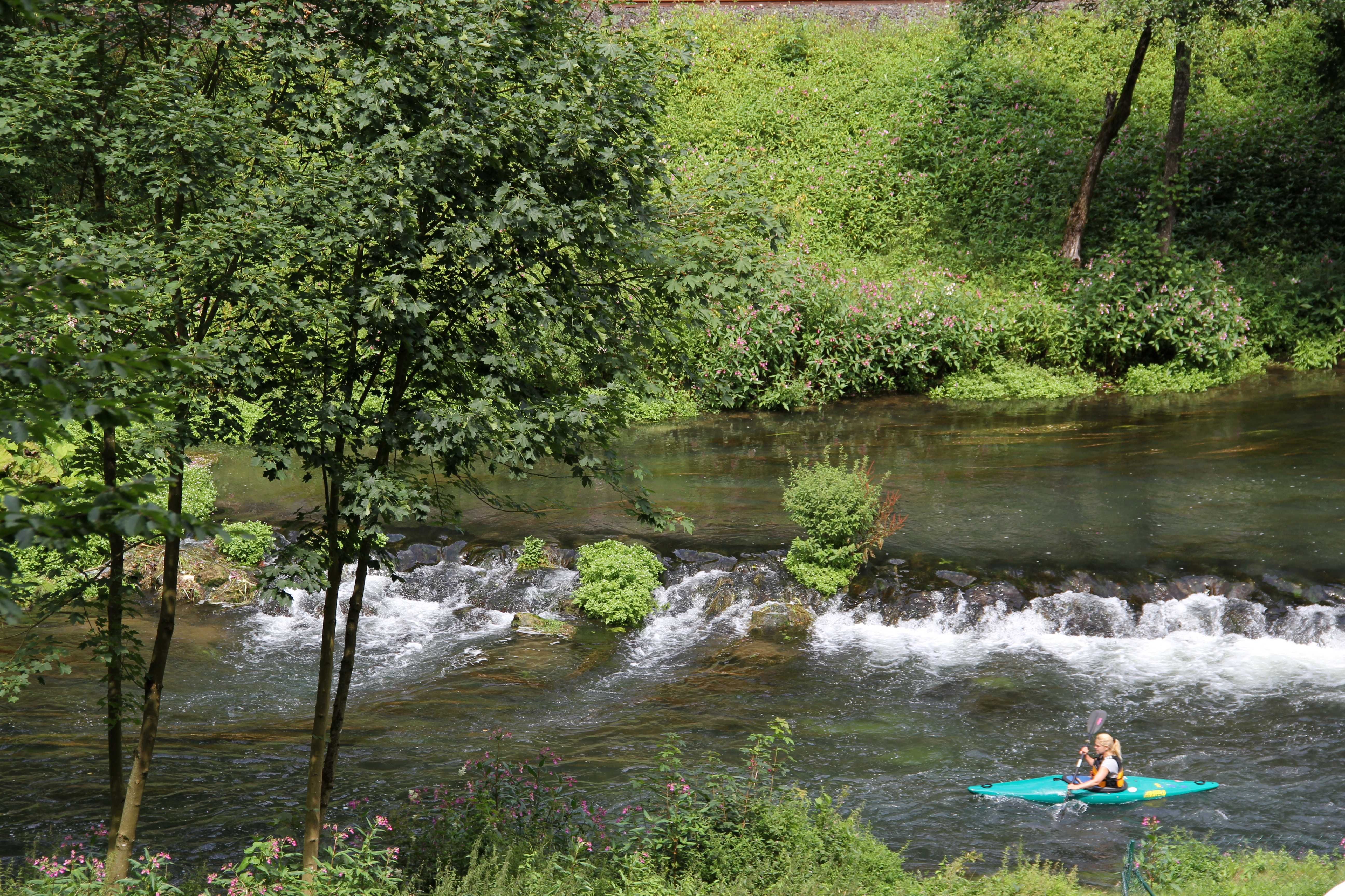 Stempfermühle, Wiesent